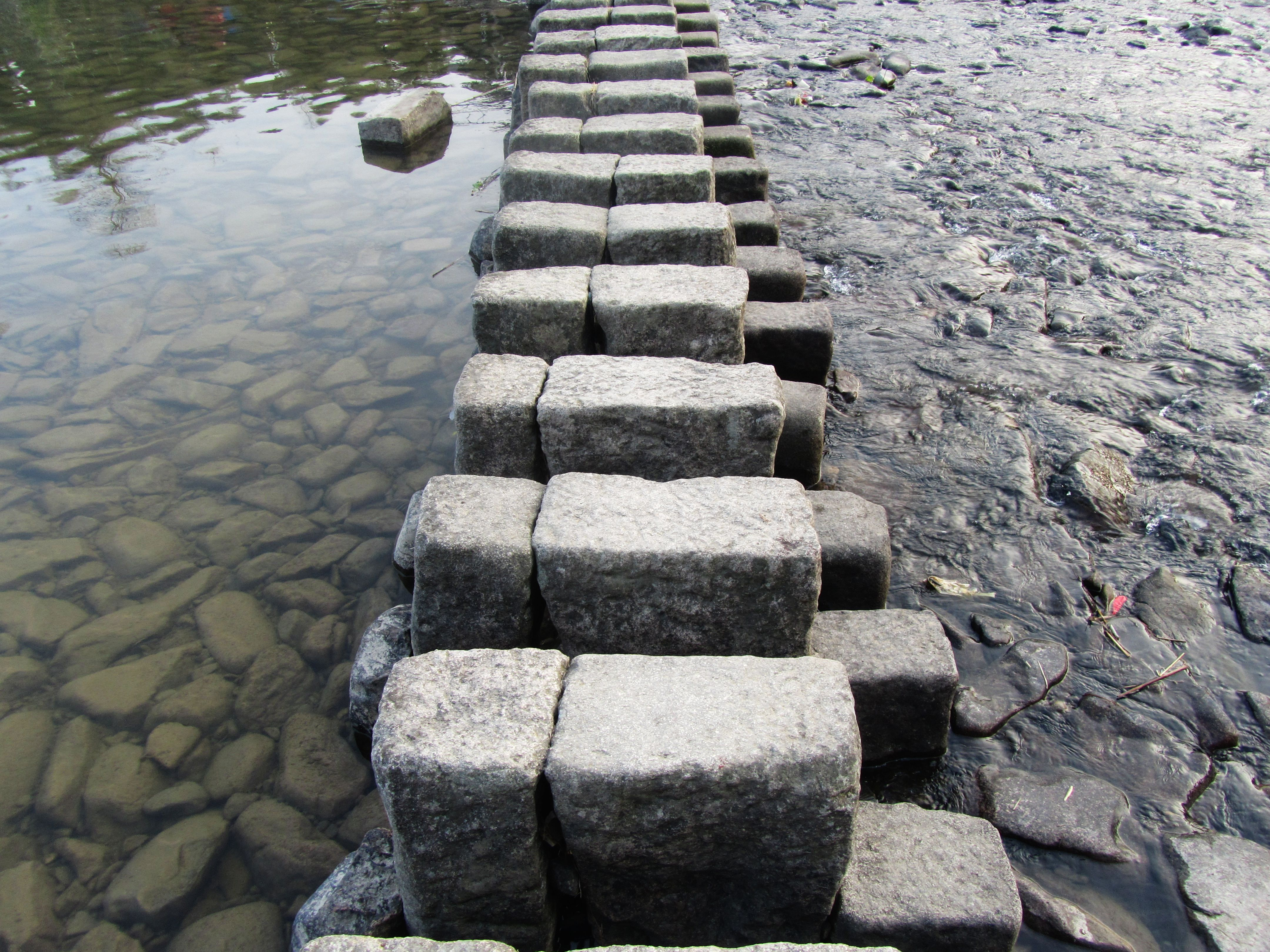 南山碇步，位于温州市泰顺县泗溪镇泗溪北涧桥与泗溪桥之间。